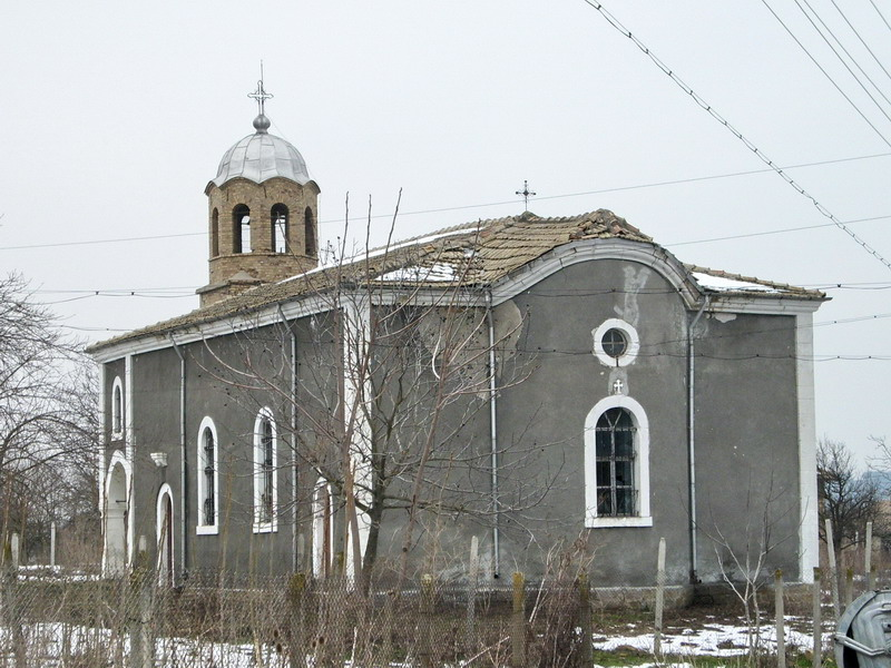 Село Глогинка, община Попово. Църковният храм.